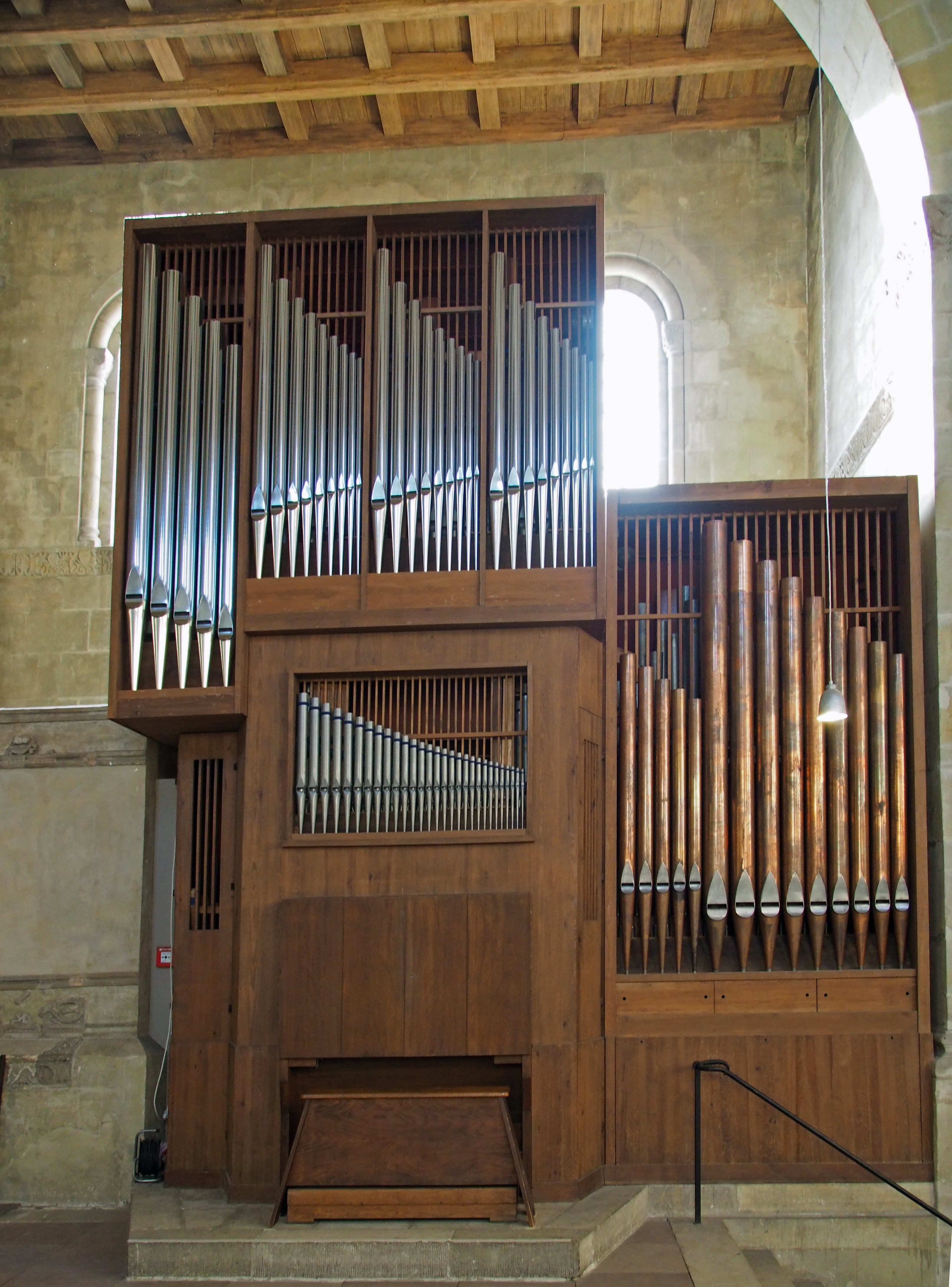 Orgel in der Stiftskirche St. Servatii Quedlinburg, Sachsen-Anhalt